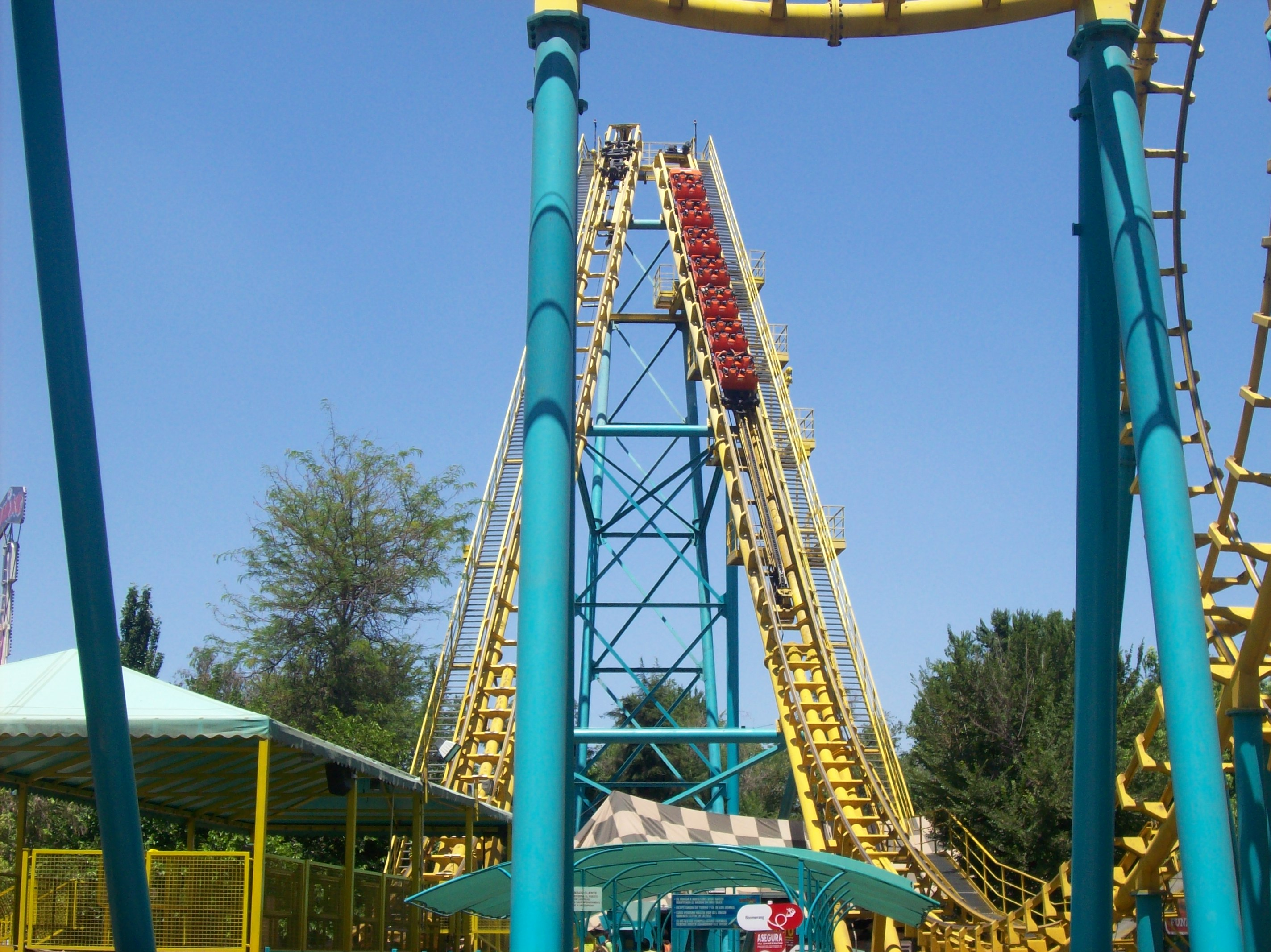 El Boomerang, la principal atracción de Fantasilandia